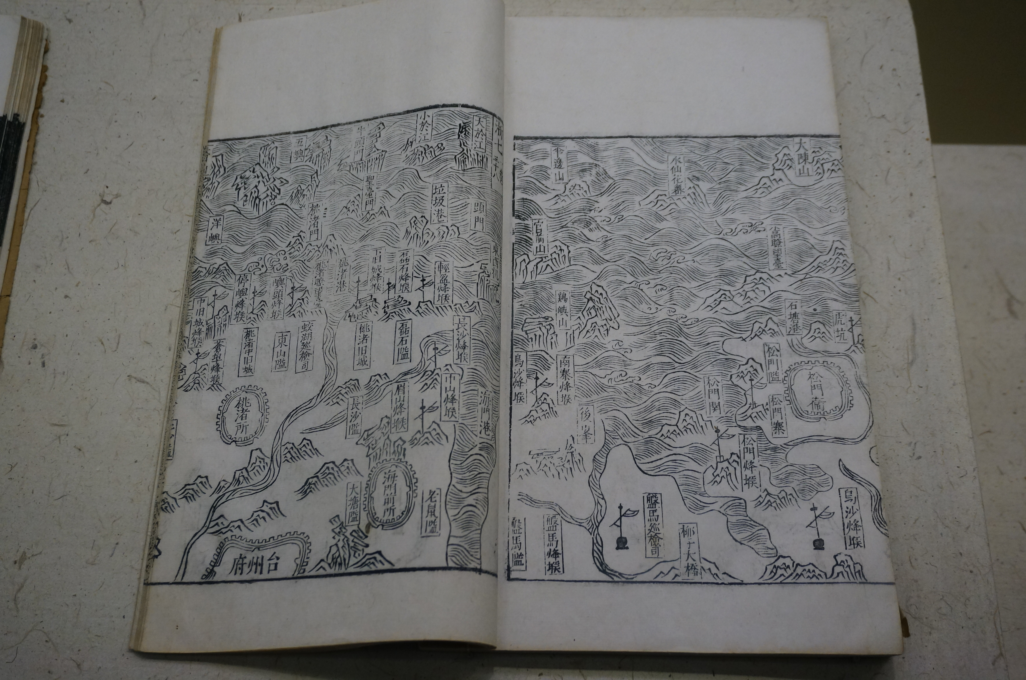 《筹海图编》卷一浙江沿海山沙图局部，明天启四年（1624）刻本，浙江省博物馆藏。